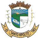 Brasão de Armas do município de Santo Hipólito, Minas Gerais, Brasil.